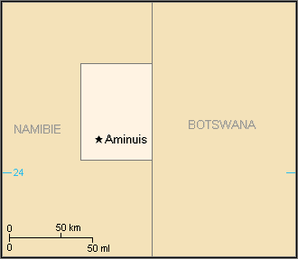 Description:Carte du Bantoustan du Tswanaland Auteur:Rémih